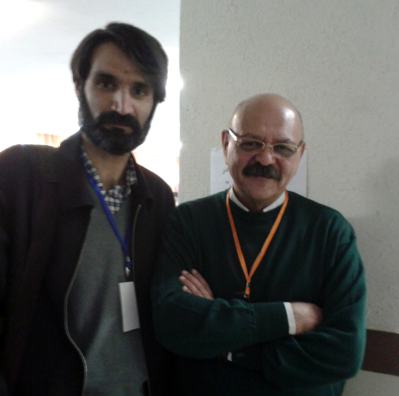 از راست: کورش صفوی، وحید رنجبر